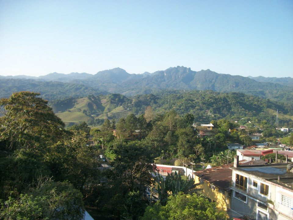 Vista a Conta